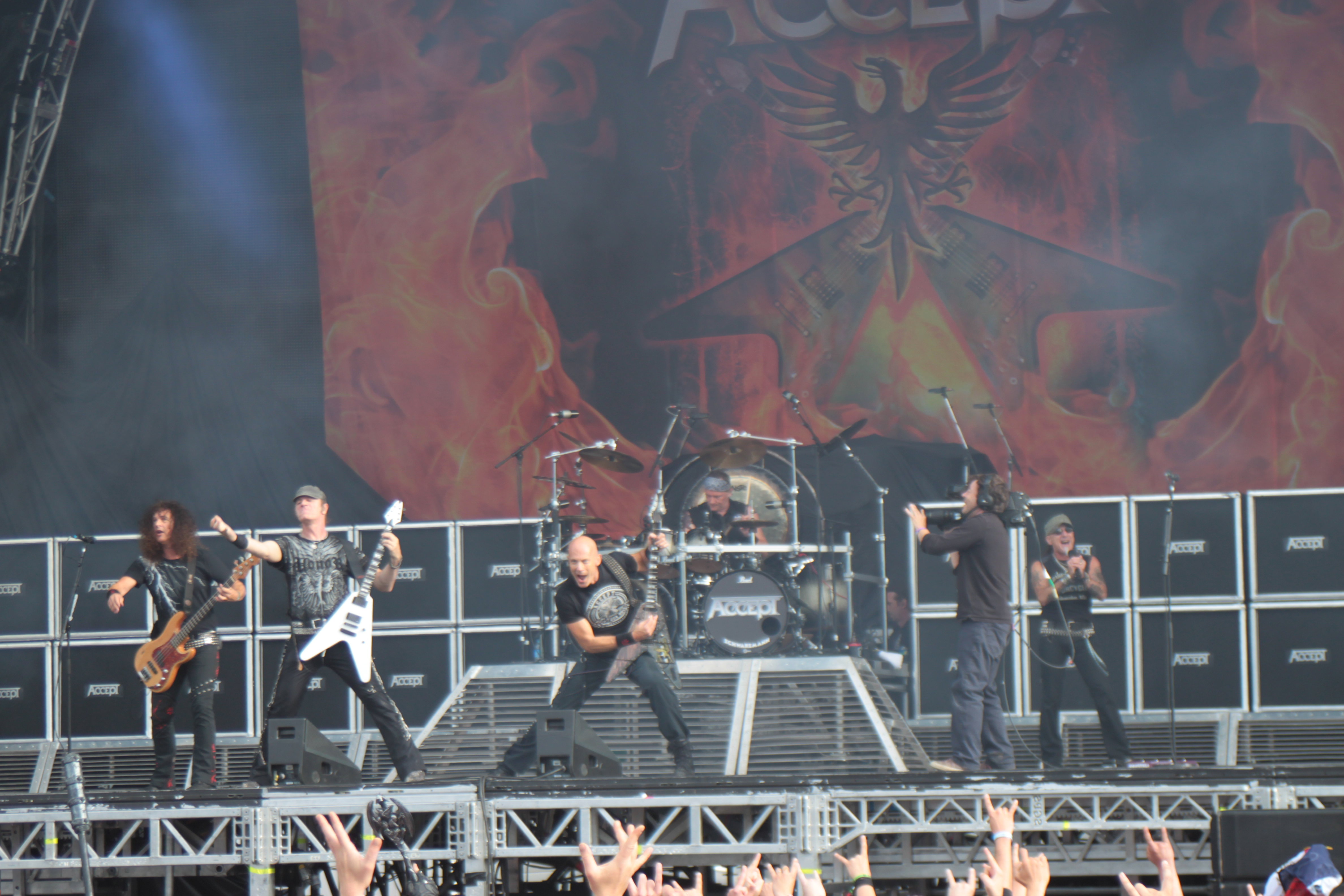 Accept, Helfest 2013, Fr-44-Clisson.